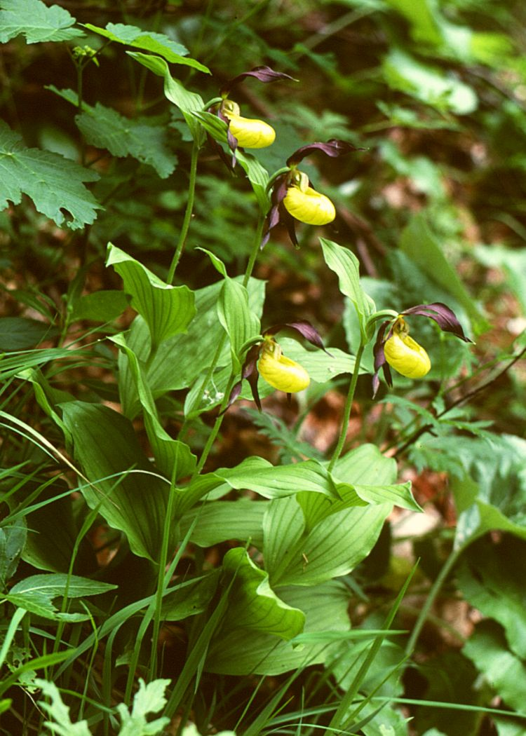 Gelber Frauenschuh (Cypripedium calceolus), Orchideen (Orchidaceae) - Österreich/Austria/Autriche: Kärnten, Karawanken, Loiblpass, Tscheppaschlucht